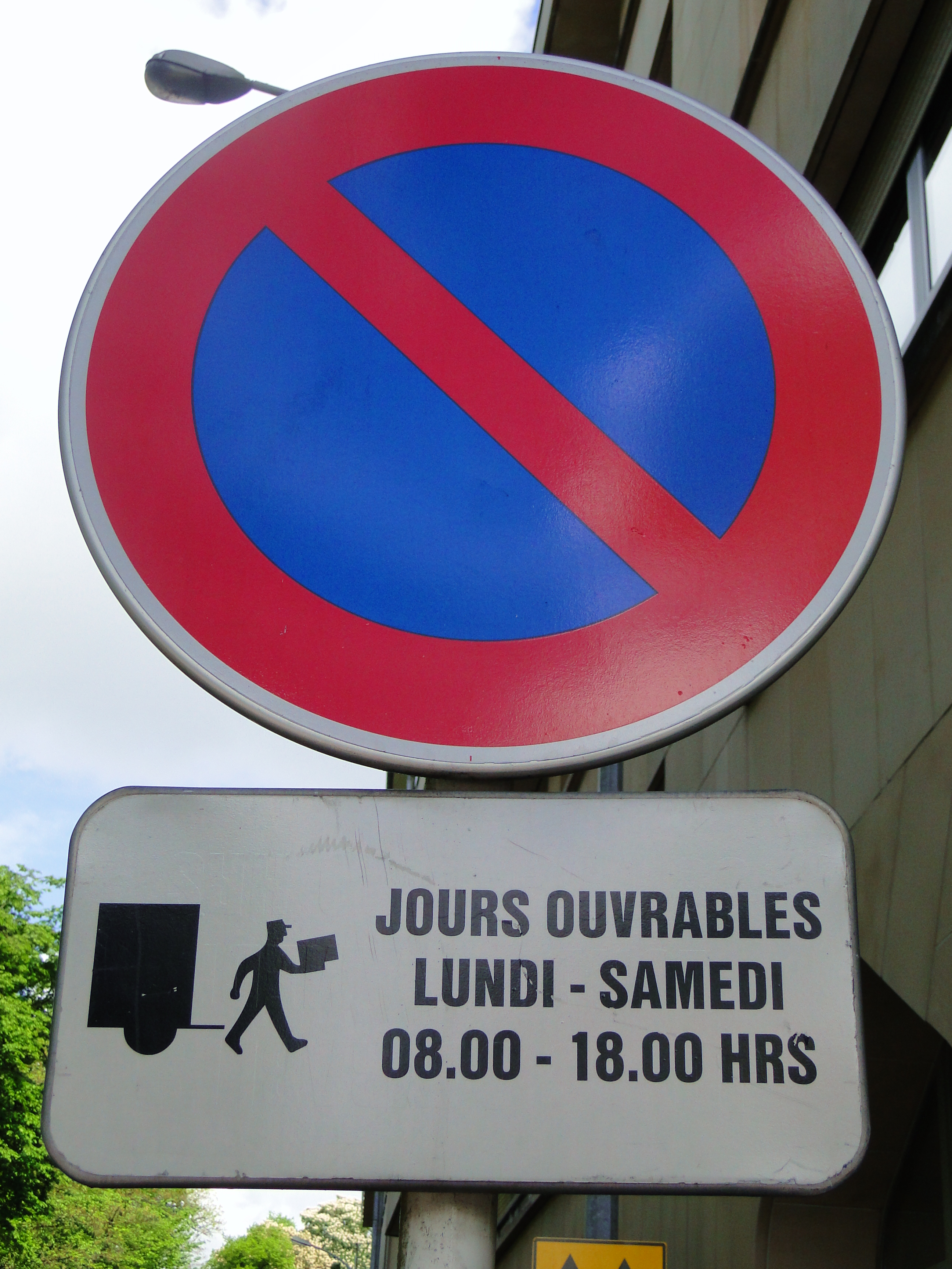 Verkéiersschëld C,18 aus dem Lëtzebuerger Code de la route mam Zousazschëld Modell 2